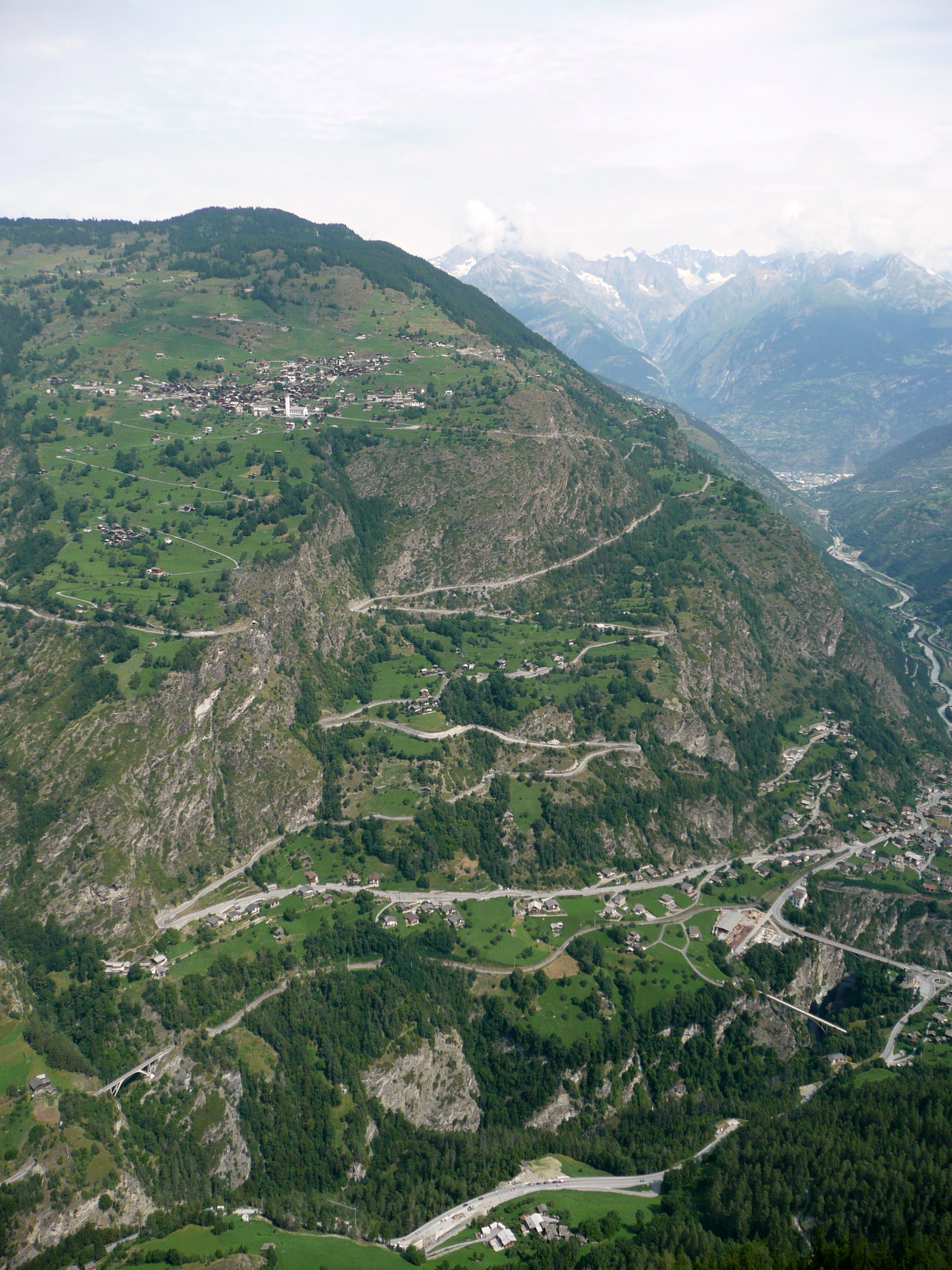 Blick von Grächen auf Törbel mit Strasse von Stalden.